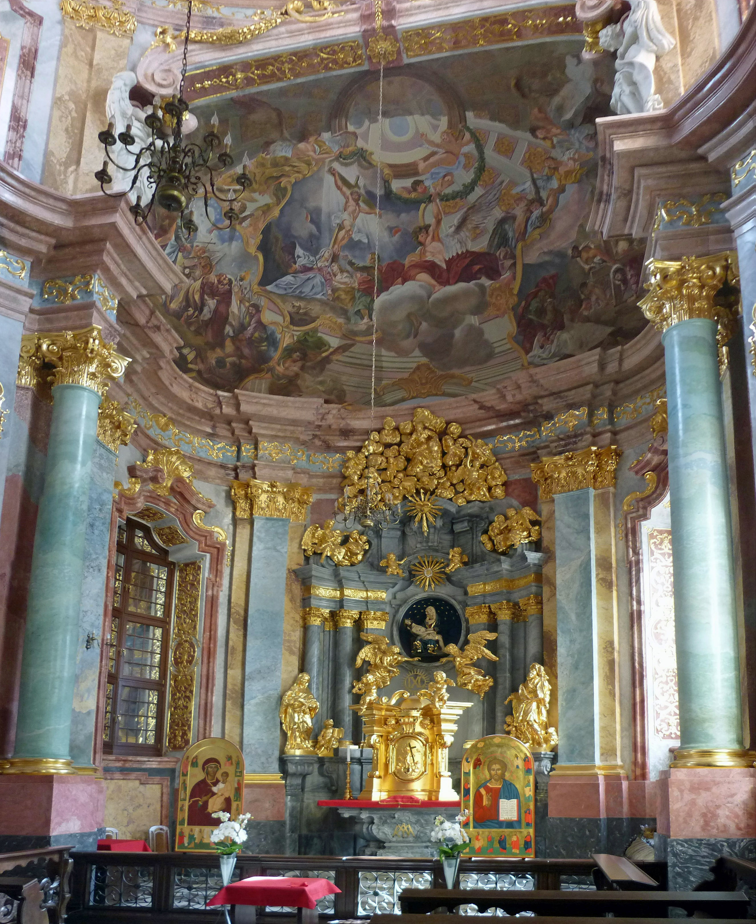 Hochberg-Kapelle in der St.-Vincenz-Kirche in Breslau/Wrocław, errichtet 1723–1727 als Grablege des Prämonstratenserabts Ferdinand von Hochberg, nach Kriegszerstörung 2000–2013 originalgetreu wiedererrichtet.